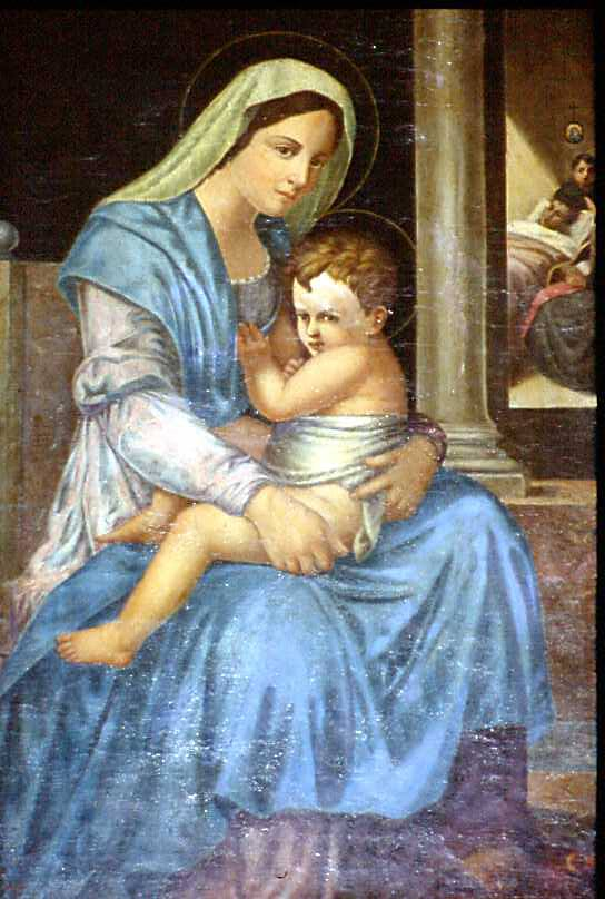 Santa Maria della Salute (Francesco Alesi,1941); chiesa di San Francesco d'Assisi